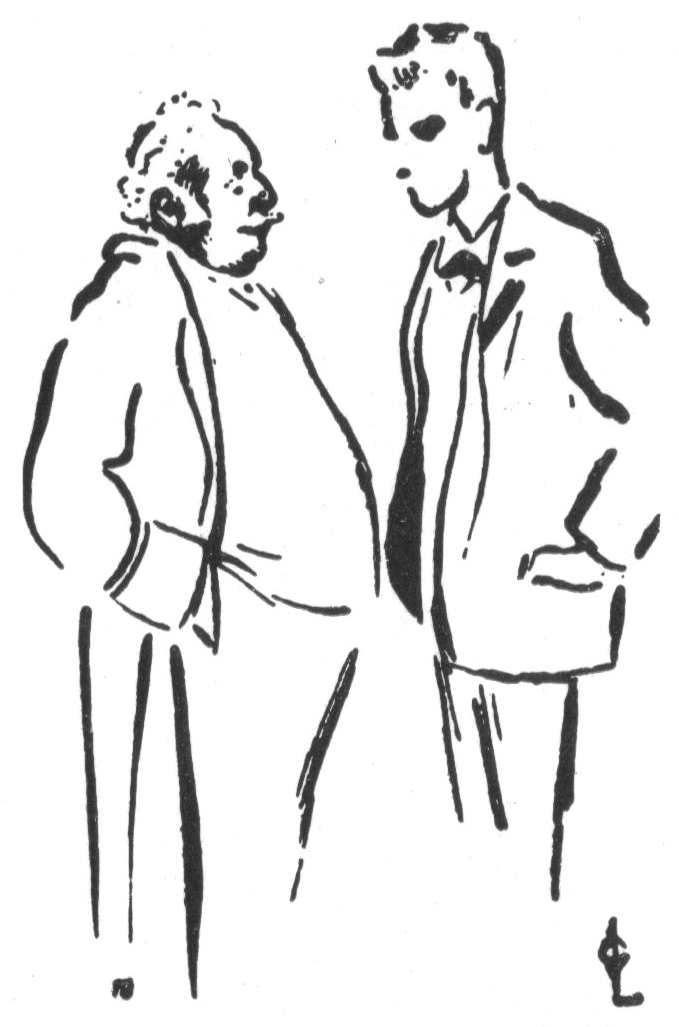 Fra en oppsetning av Gunnar Heibergs «Kjærlighet til næsten» i 1903. Fra venstre: Harald Stormoen som kapteinen, August Oddvar som Anders Evensen.